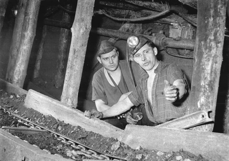 Oelsnitz, Steinkohlewerk, Bergarbeiter, Förderband Zentralbild Schlegel 18.4.1958 Planvorsprung zu Ehren des V.Parteitages der SED 15 Tage Planvorsprung bis zum V.Parteitag der SED wollen die Kumpel der Jugendbrigade Makarenko im volkseigenen Steinkohlenwerk "Karl Liebknecht" in Oelsnitz erreichen. Die Jugendbrigade, die kürzlich mit dem Titel "Hervorragende Jugendbrigade der DDR" ausgezeichnet worden ist, hat bis jetzt einen Planvorsprung von 5 Tagen erreicht. UBz: Brigadier Horst Preußker, Träger des Ordens "Banner der Arbeit" (rechts), im Gespräch mit Steiger Lemmel über die Arbeit des Panzerförderers.